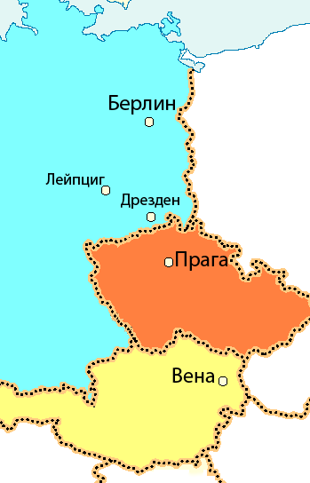 Карта городов - точек маршрута Моцарта во время его берлинского путешествия в 1789 году.